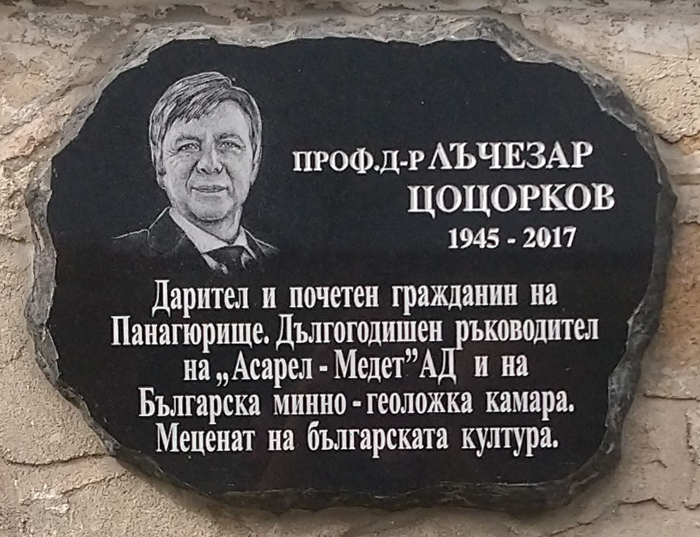 Проф. д-р Лъчезар Цоцорков (1945-2017) - плоча в Исторически музей Панагюрище - Надпис: Дарител и почетен гражданин на Панагюрище. Дългогодишен ръководител на "Асарел Медет" АД и на Българска минно-геоложка камара. Меценат на българската култура